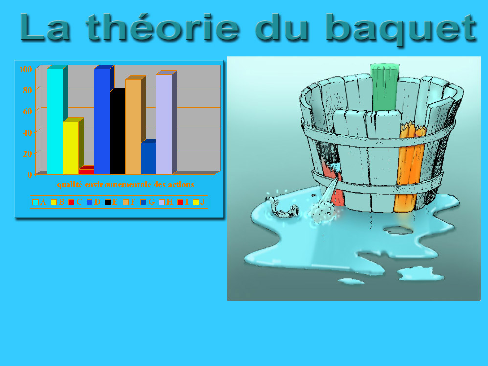 La "théorie du Baquet" rappelle que dans le baquet (méthaphore d'un système, d'une organisation où tous les éléments auraient une importance égale), ce n'est pas la plus haute planche (chaque planche est la représentation métaphorique des sous-élément du système, ou de sa performance individuelle), mais la plus basse qui contrôle le niveau de l'eau (représentant métaphoriquement le résultat ou la performance globale). Le diagramme barre de gauche présente la même chose, mais en insistant moins sur l'importance relative des éléments les uns par rapport aux autres (par exemple pour les engrais NPK utilisés comme intrants, le manque d'un des 3 éléments fera que les autres ne seront pas utilisés de manière optimale par une plante). Dans le développement durable, tous les piliers sont importants... Il ne sert à rien d'être excellent sur l'économique et le social, si le pilier environnemental s'est effondré ; L'ensemble du système dysfonctionnera..